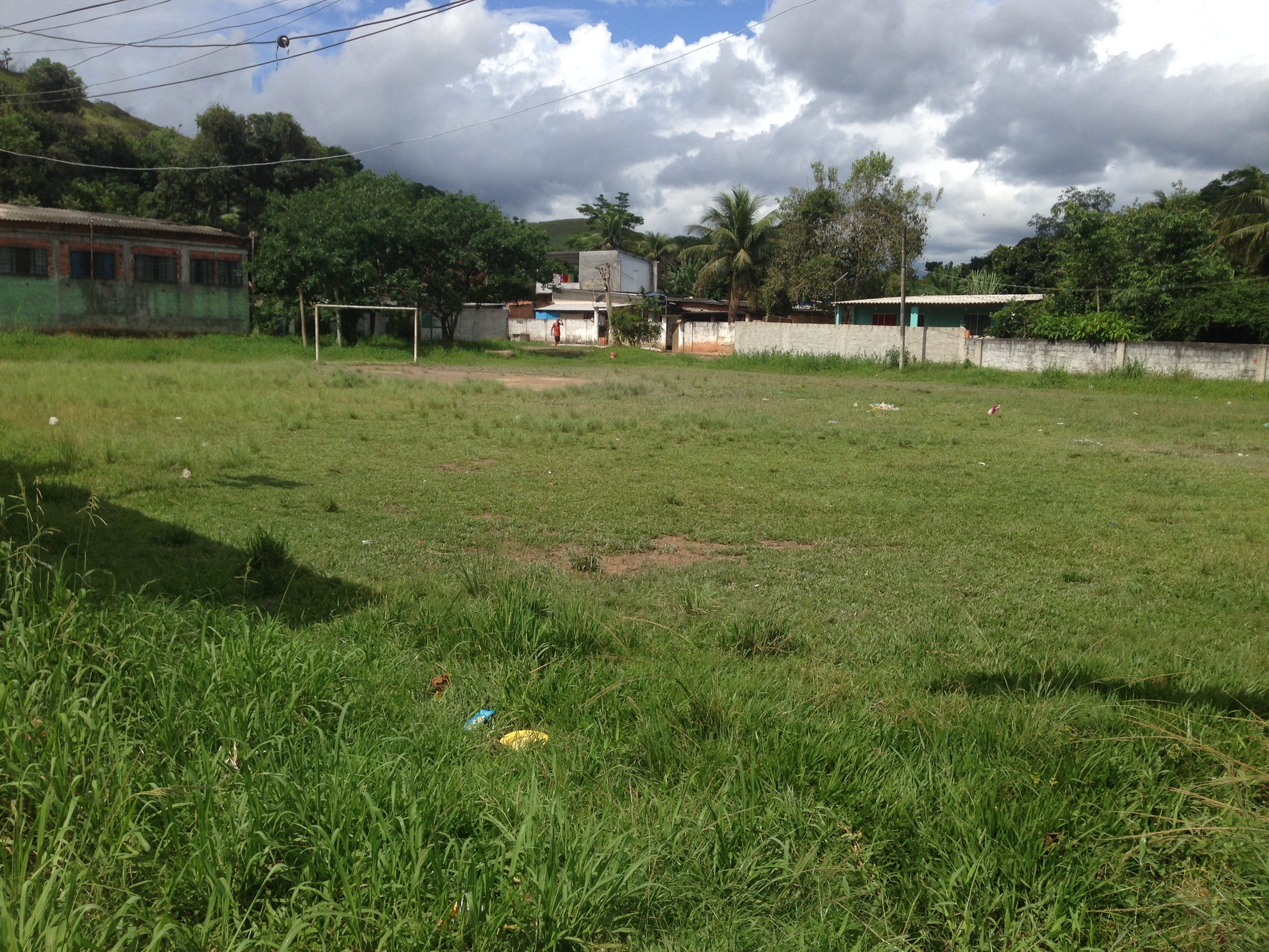 Essa fotografia foi retirada no ano de 2019, campo de Vila Recreio (Magé)